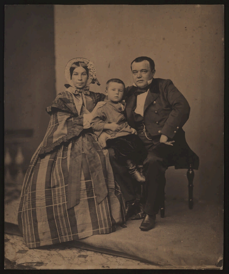 Художник Тихобразов Николай Иванович с женой и сыном Александром